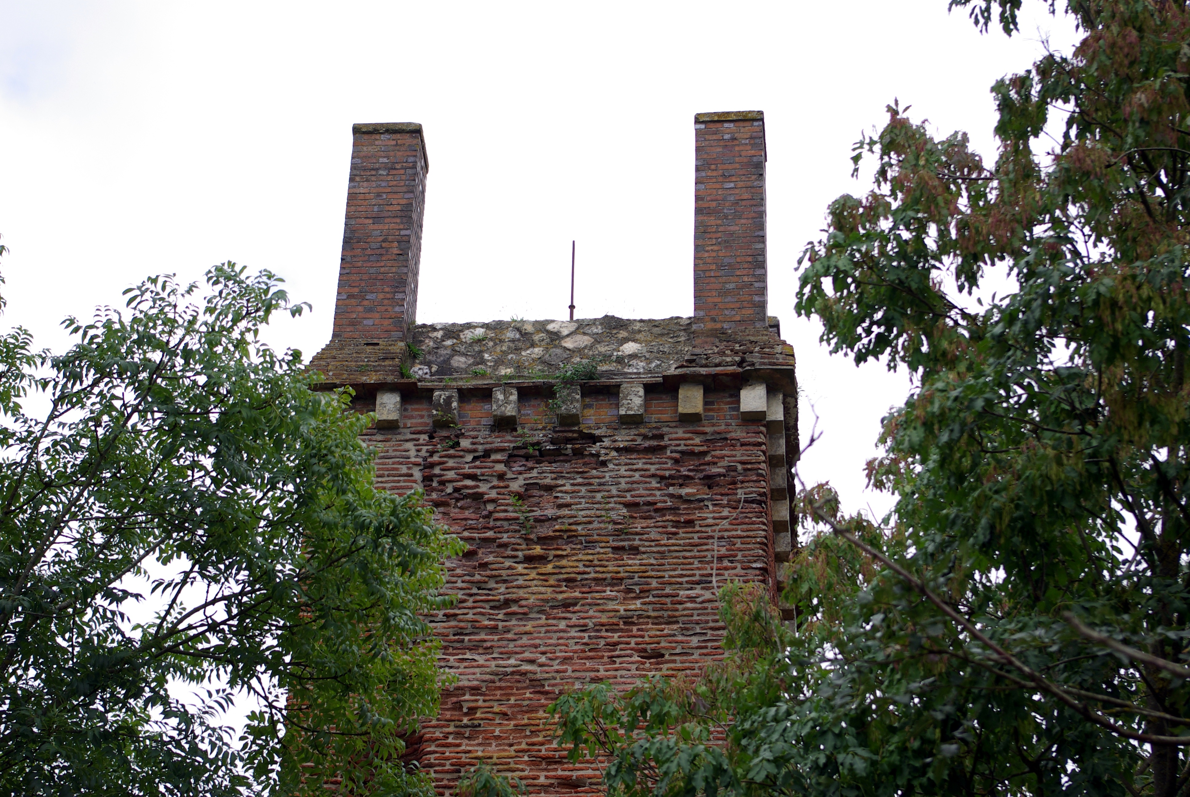 Partie haute de la pile romaine de Cinq-Mars-la-Pile.